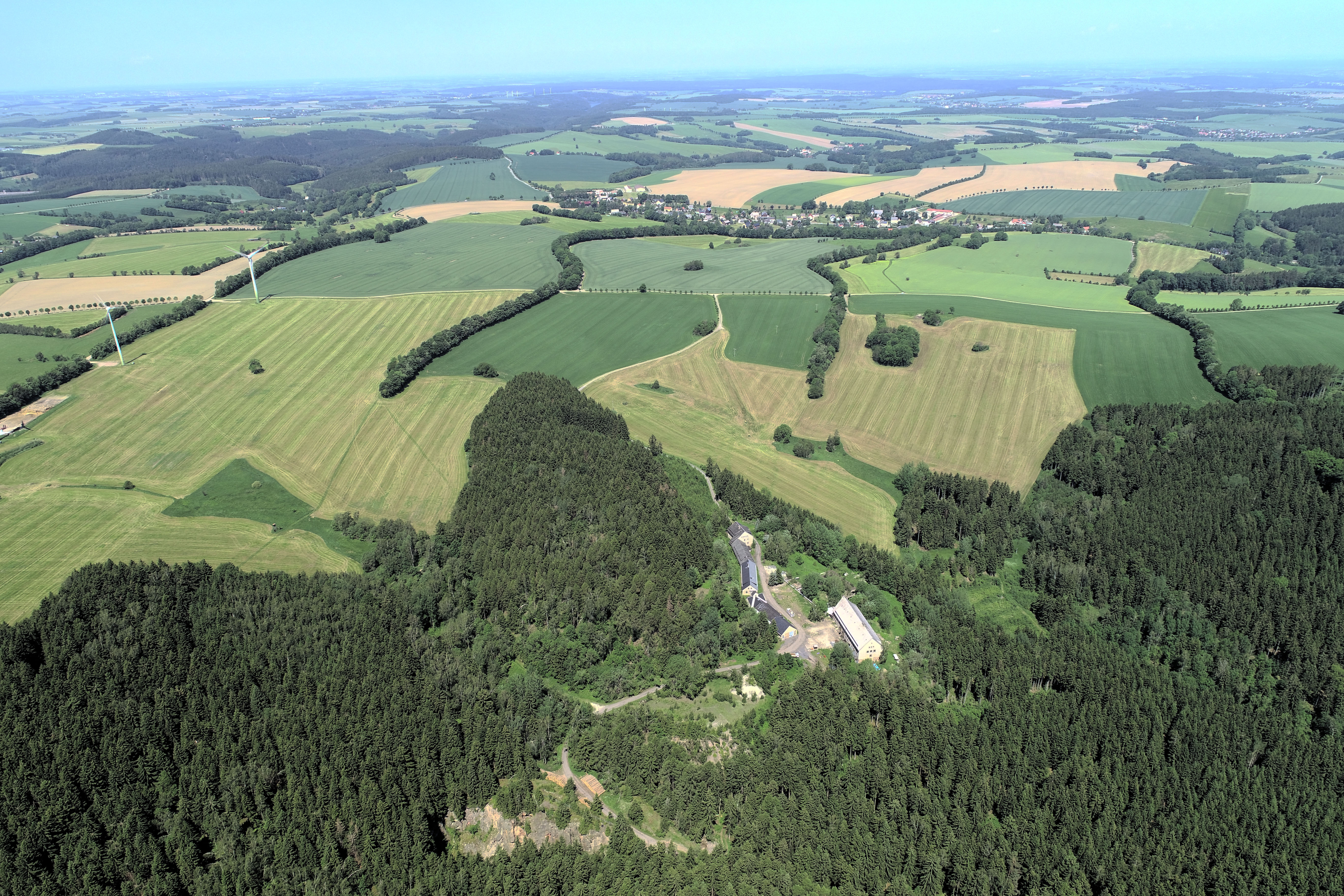 Luftbild der Tagesanlagen der Kupfergrube Sadisdorf im heutigen Zustand. Aufnahmerichtung etwa von Süden nach Norden. Die Horizontlinie markiert den Verlauf des Elbtalgrabens.